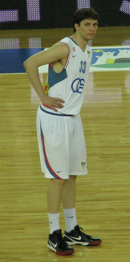 Marko Tomas